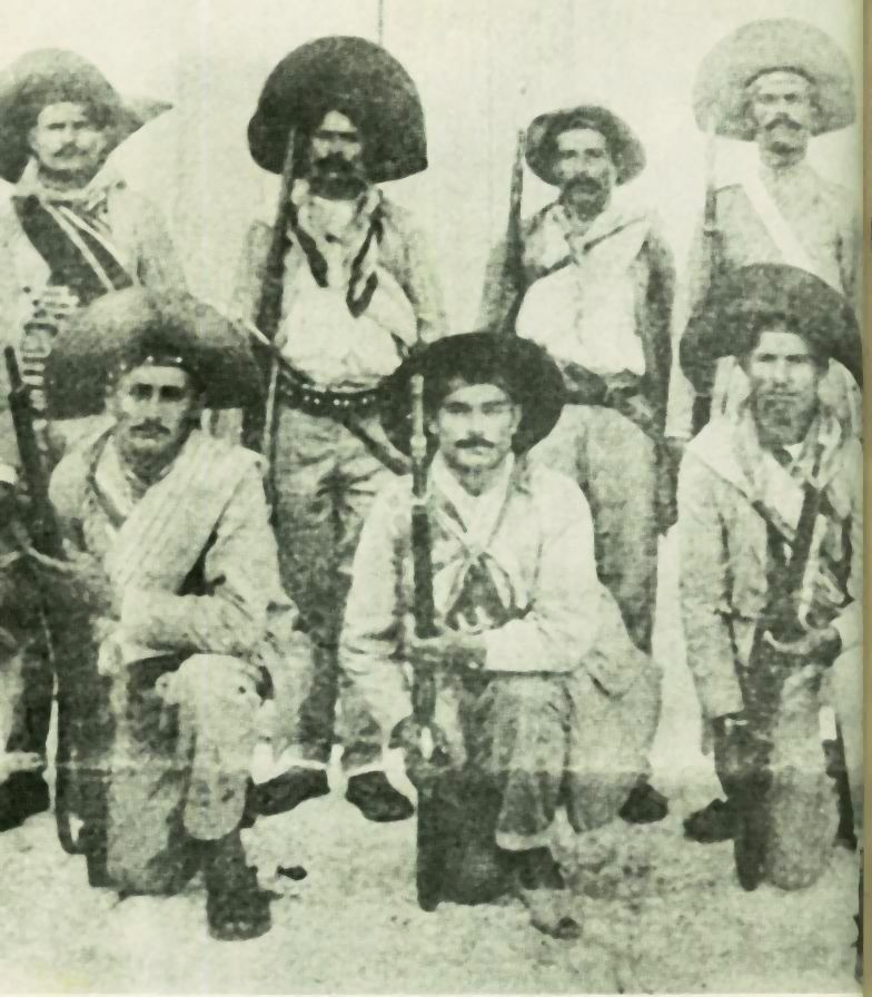 Antonio Silvino e seu bando (em pé segundo a esquerda)